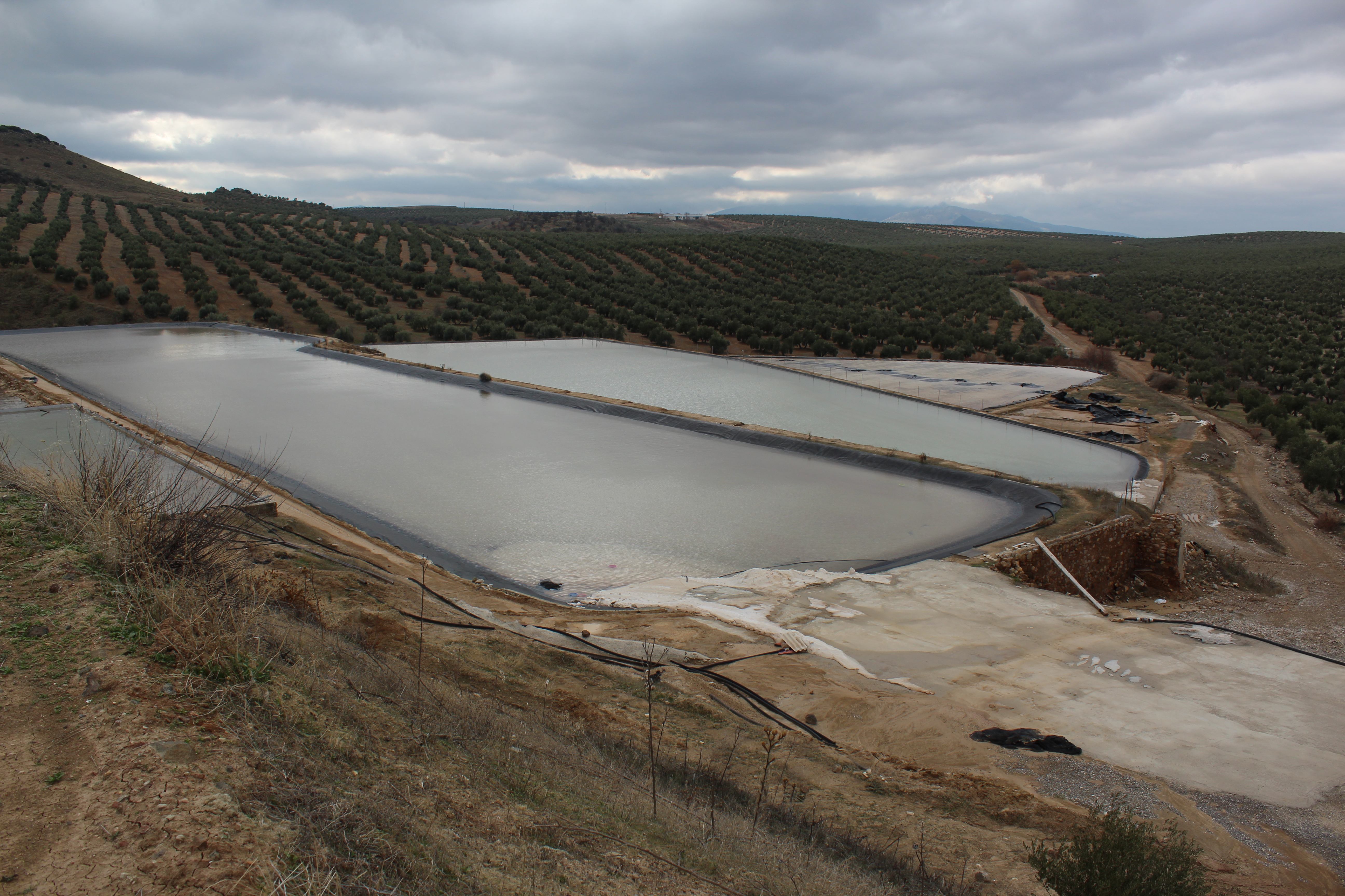 Vista general de las balsas de desecación de las Salinas de Lagartijo.